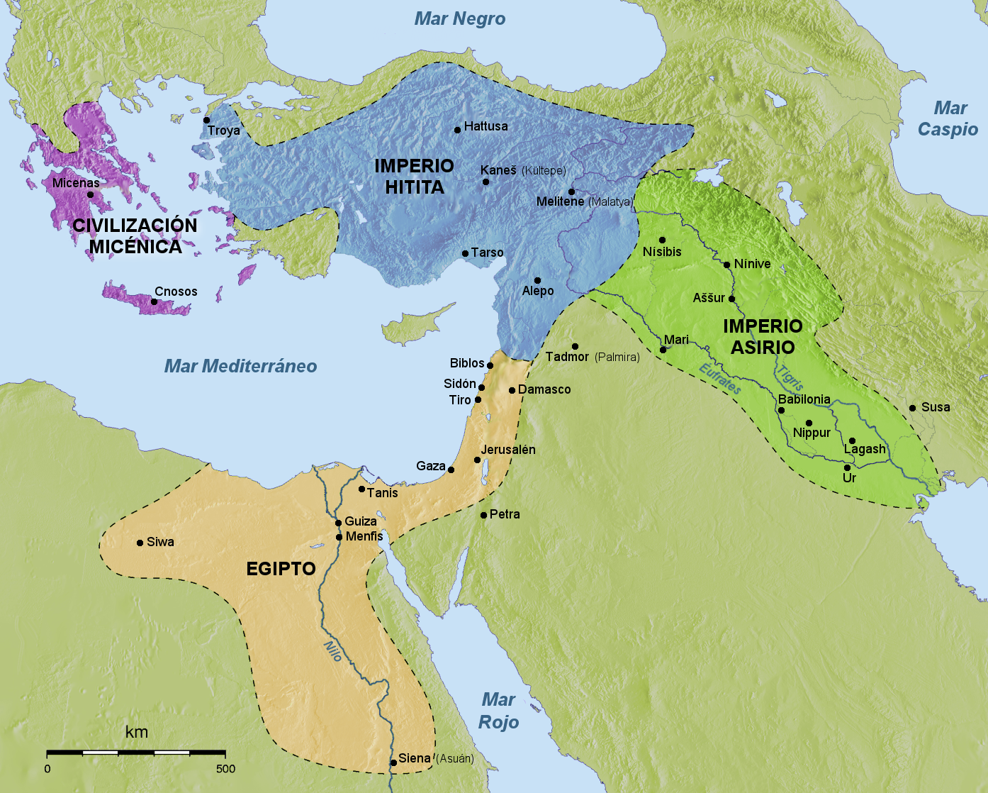 Asia Menor, Mesopotamia y Egipto hacia 1400 aC